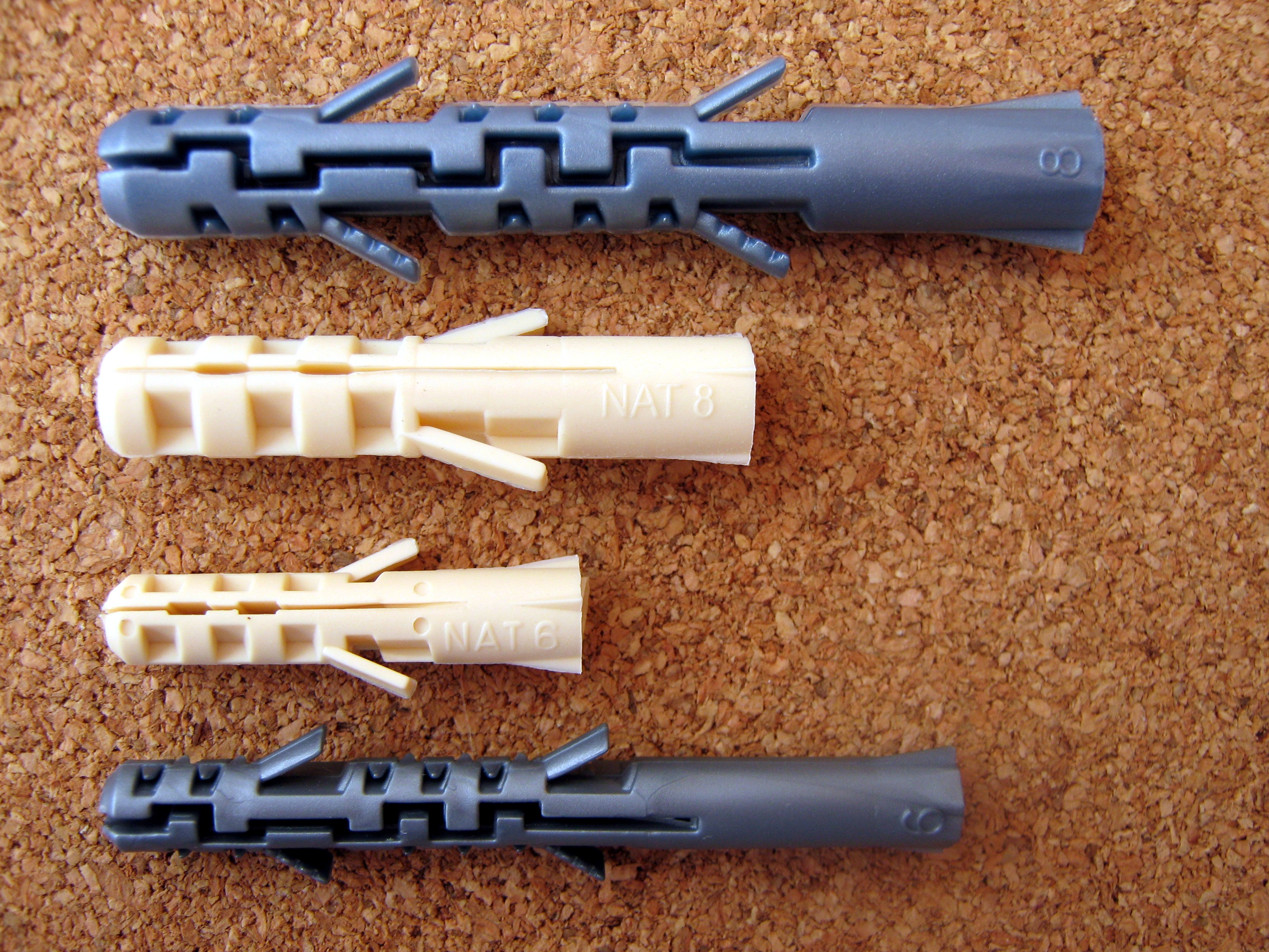 Дюбели